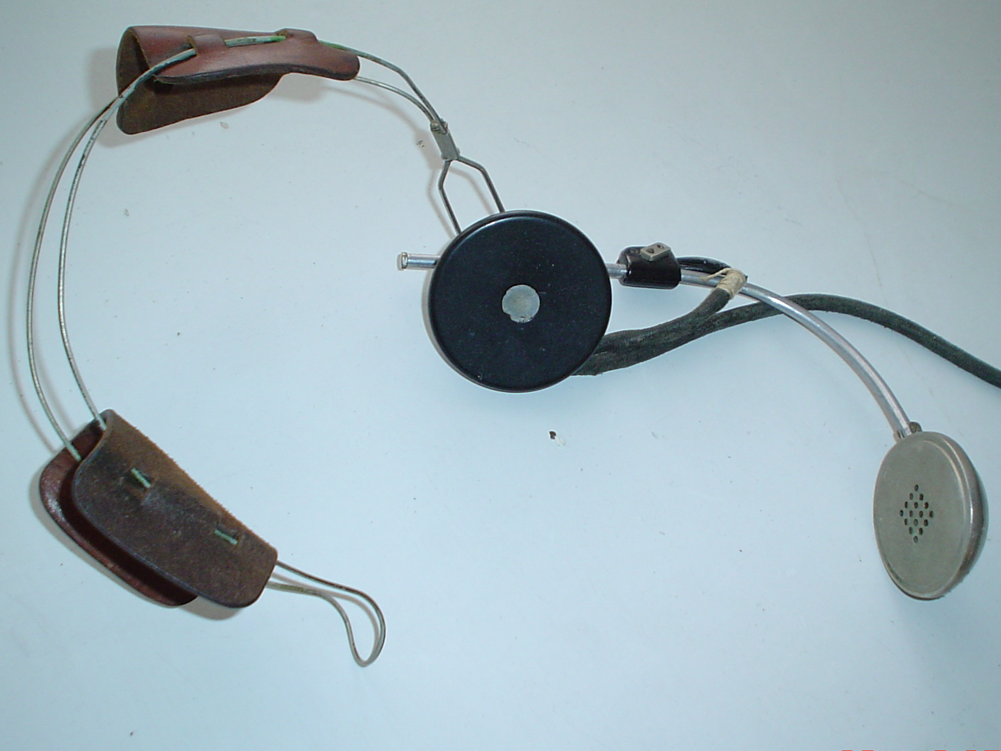 Manipulistina kapa telefoneto